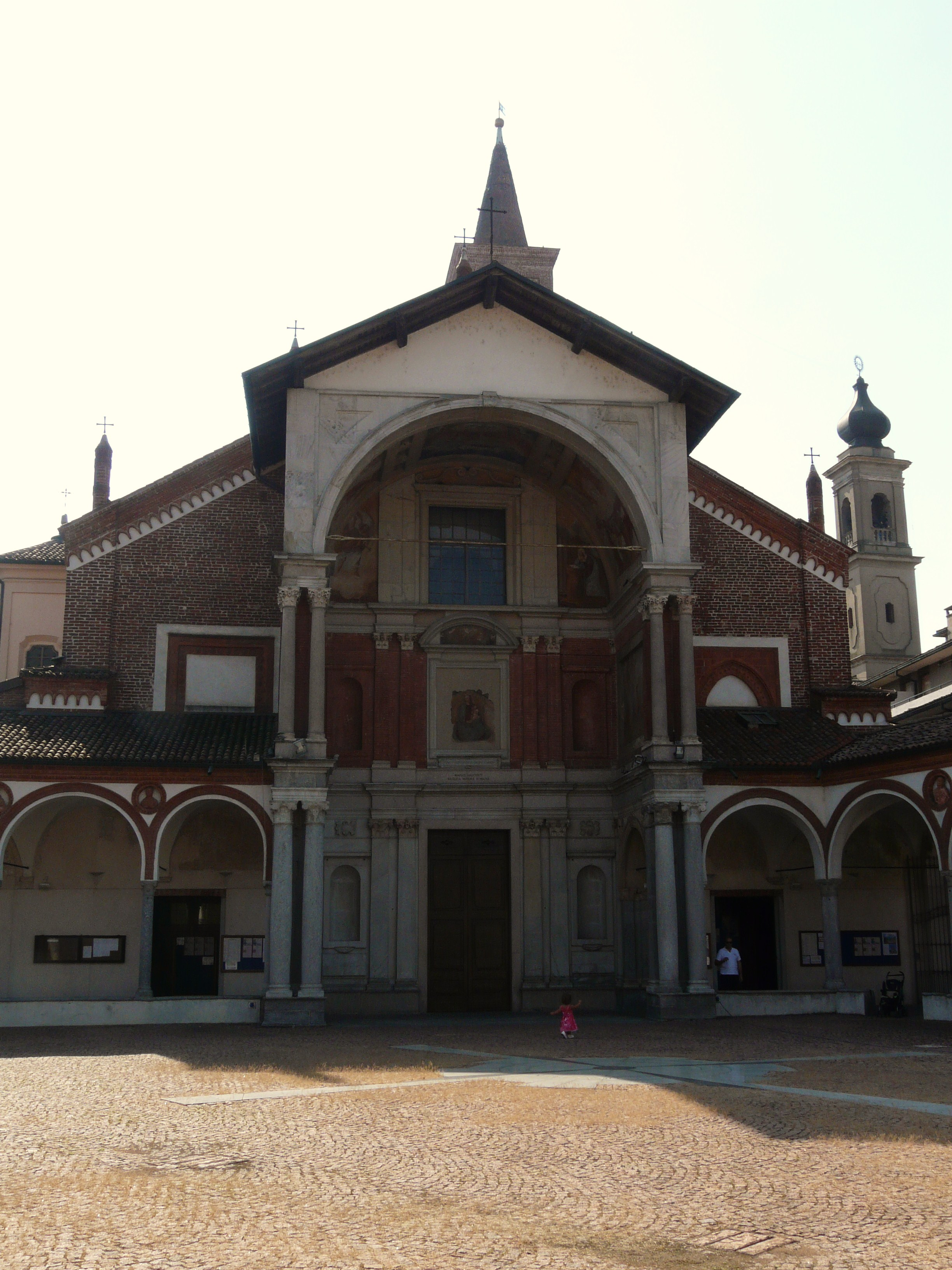 Basilica di Santa Maria Nuova, Abbiategrasso, Lombardia, Italia